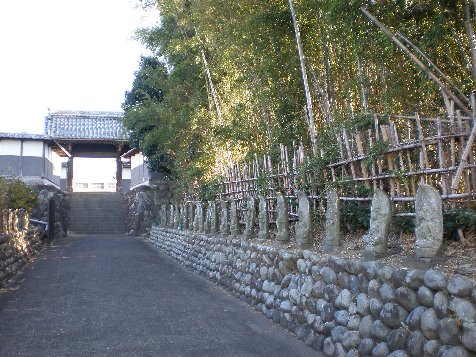 愛知県小牧市にある陶昌院山門